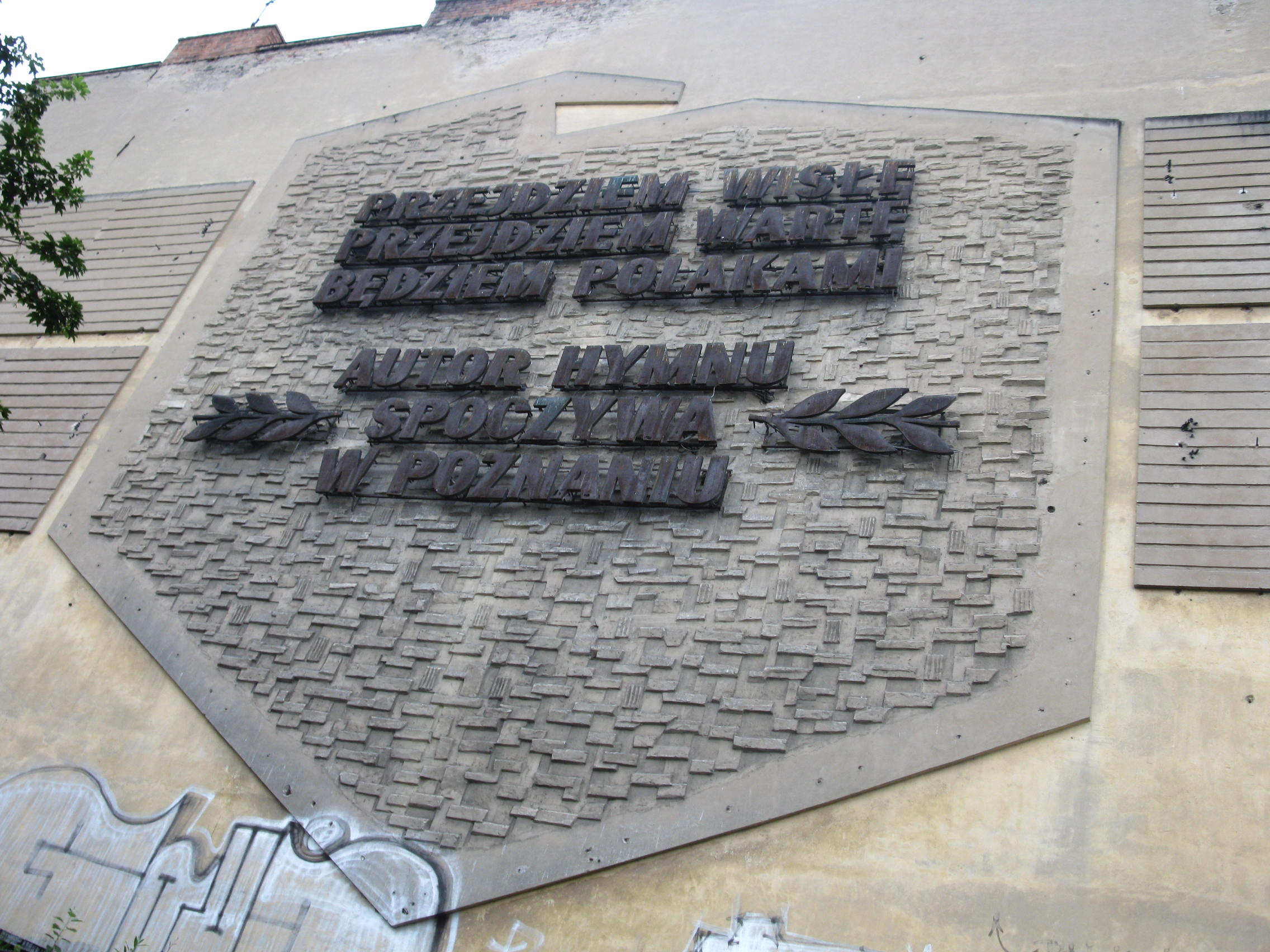 Elewacja budynku na ul. Chwaliszewo 63 w Poznaniu